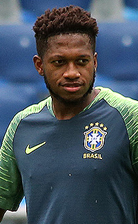 Грядет латиноамериканская битва. Сборные Бразилии и Коста-Рики готовятся к матчу